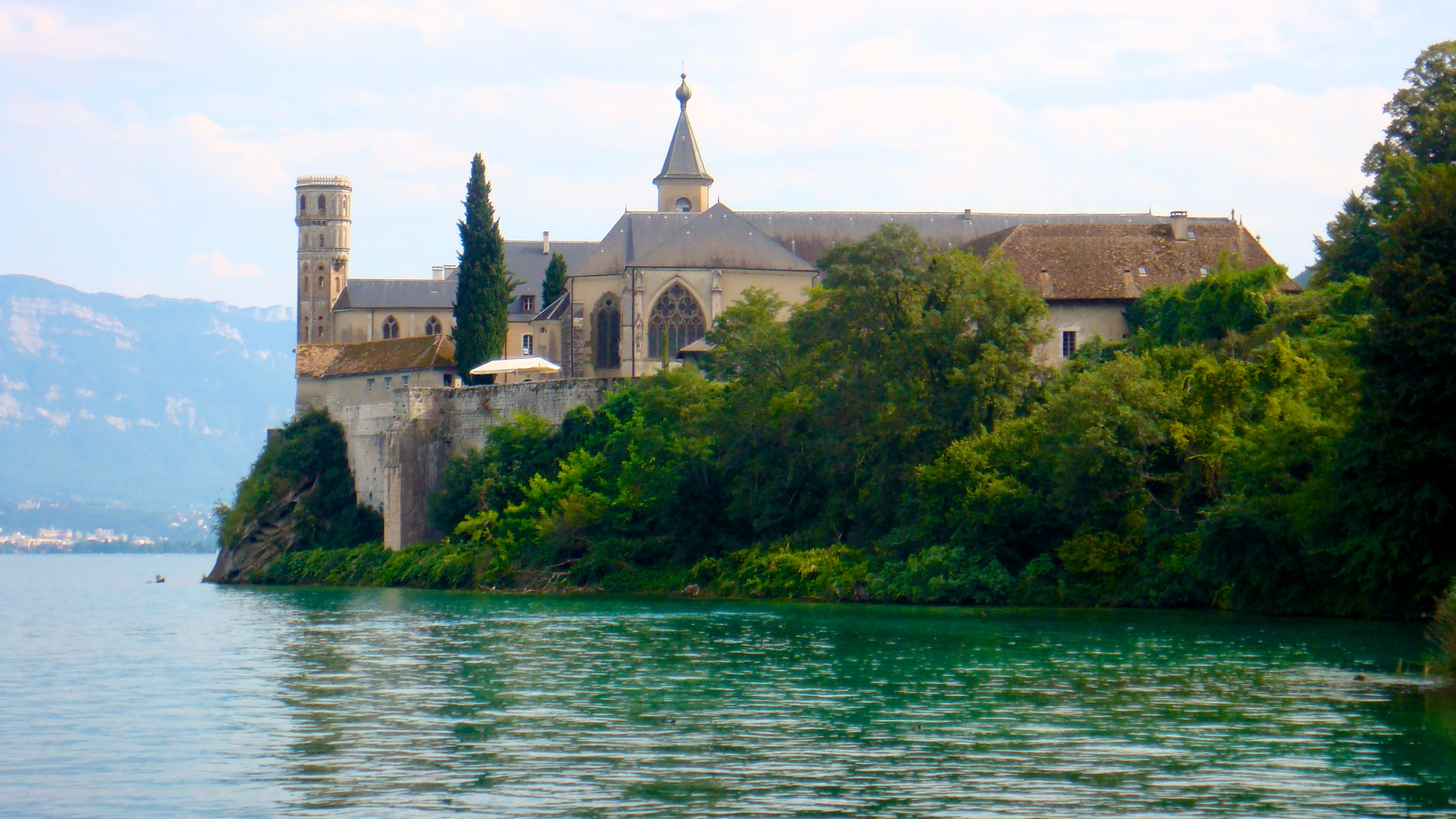 Abbaye d'Hautecombe, Savoie, France .